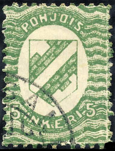 Первая почтовая марка Северной Ингрии (Ингерманландии), 1920.